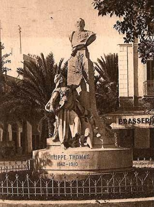 Statue de Philippe Thomas autrefois présente à Sfax